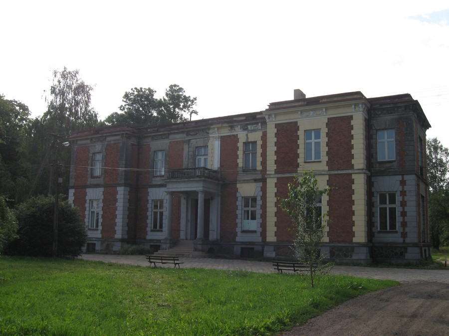 Krośniewice, ul. Toruńska 7 - pałac, mur., 2 poł. XIX w. (zabytek nr 318/409 z 11.07.1967)